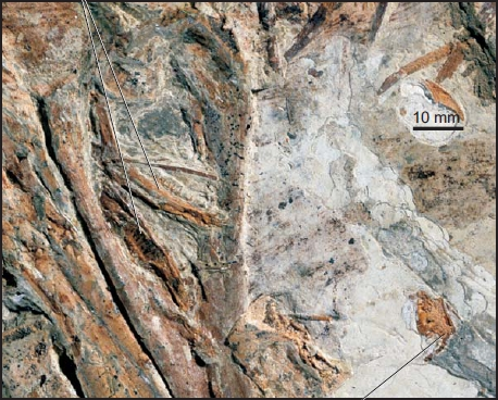 Dettaglio di mandibola di Sinobaatar e due mandibole di Zhangheotherium probabilmente ultimo pasto di un Sinosauropteryx prima